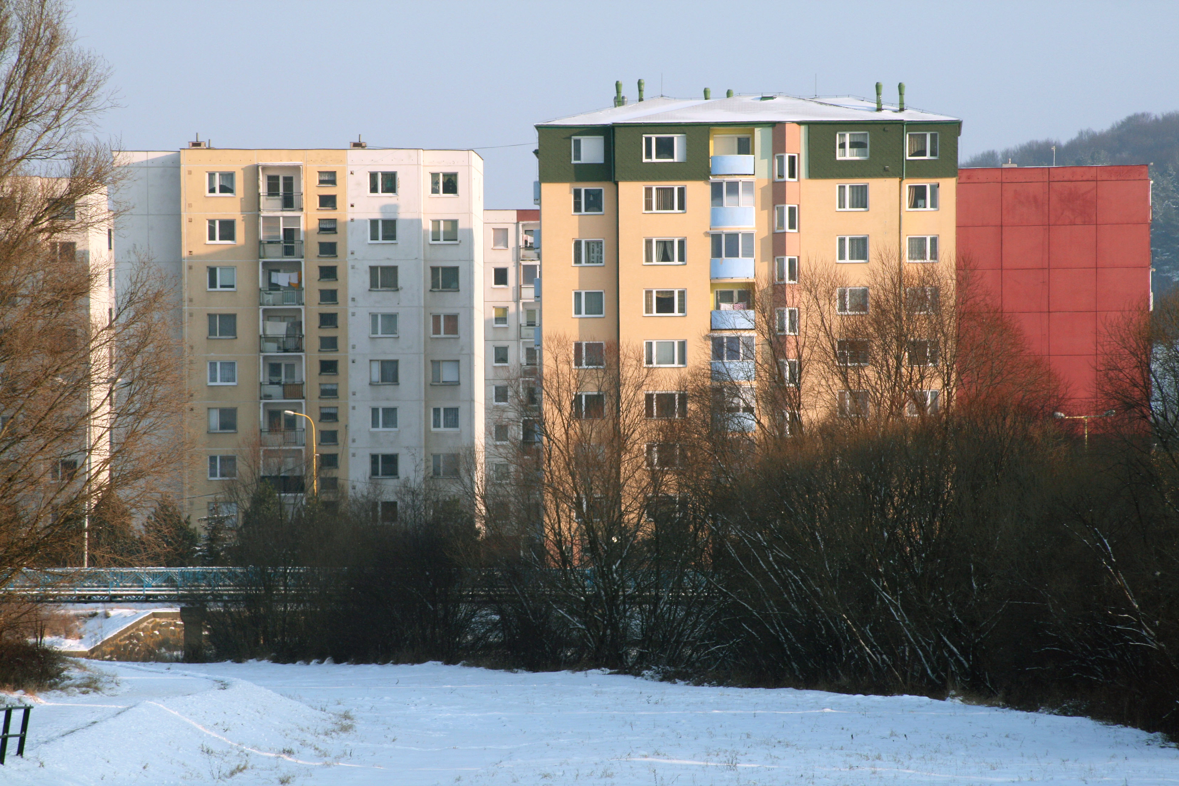 V sedemdesiatich rokoch 20. storočia na ľavom brehu Ladomirky vo Svidníku boli postevené nové obytné panelové domy